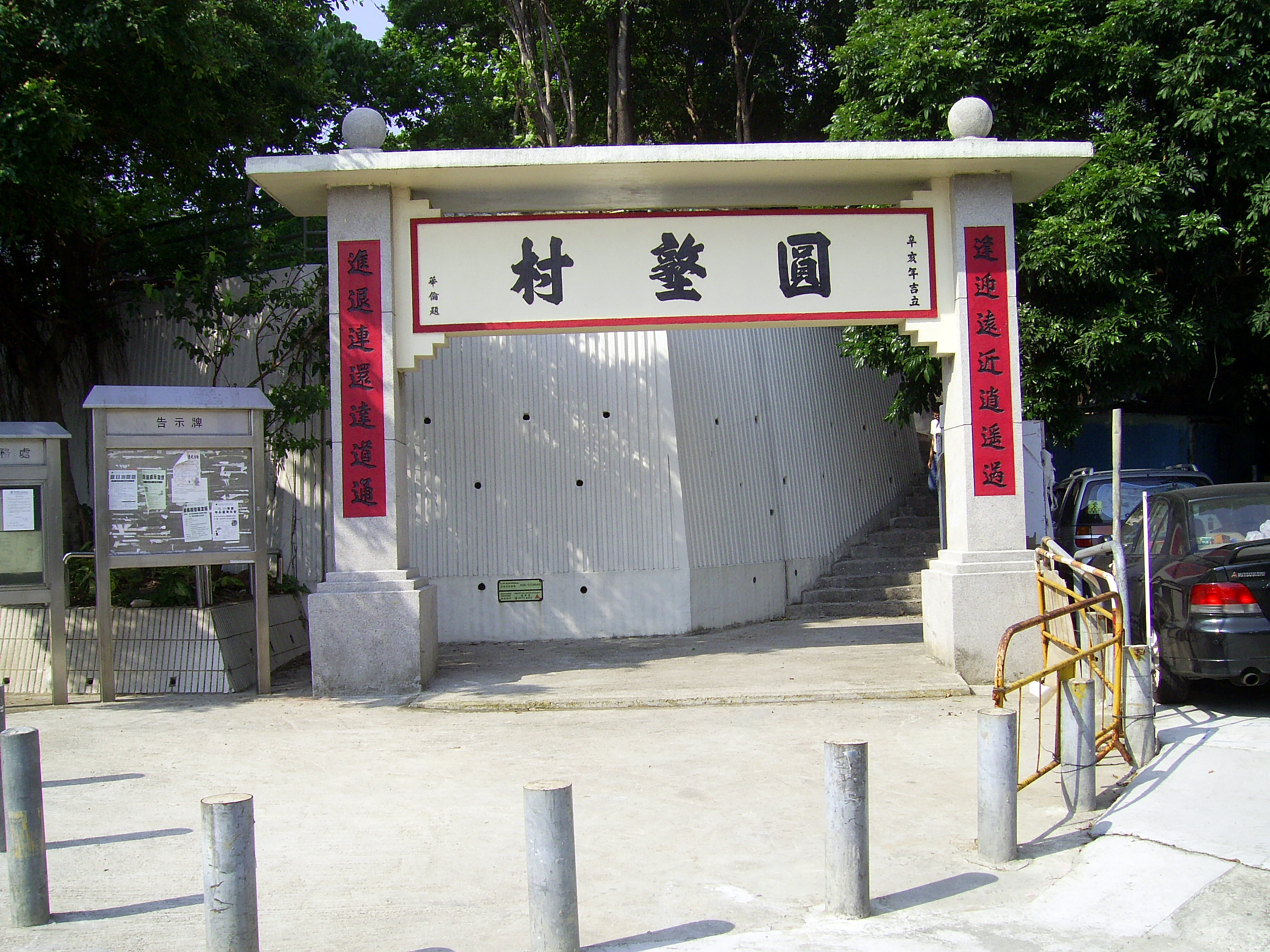 中文（香港）: 圓墩村牌坊